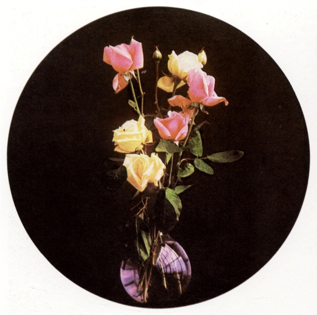 Ein Pinatypie-Diapostiv (70 x 70 mm)